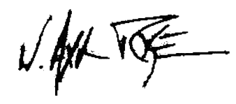 Firma de Axl Rose